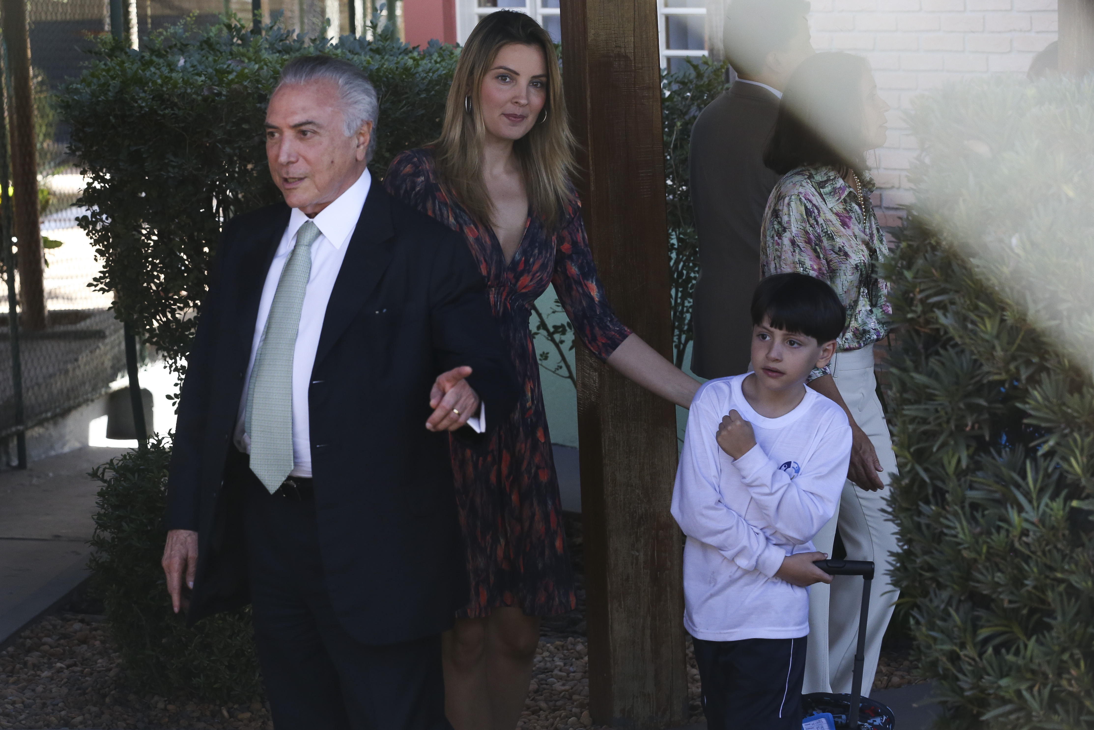 Brasília - O presidente interino, Michel Temer, acompanhado pela mulher, Marcela Temer, busca o filho Michelzinho na escola, no Lago Sul (José Cruz/Agência Brasil)